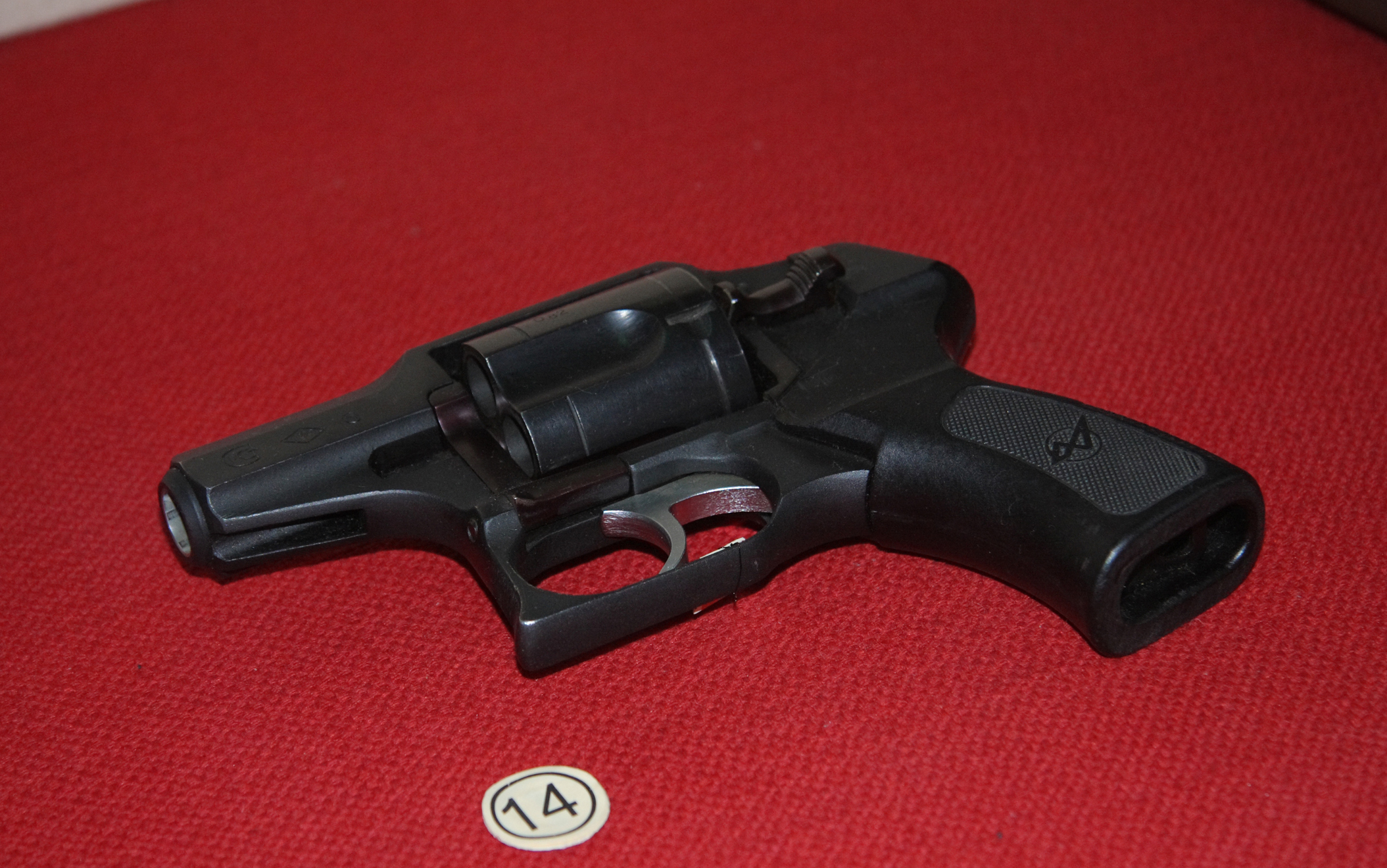 Револьвер служебный Удар-С (Udar-S)